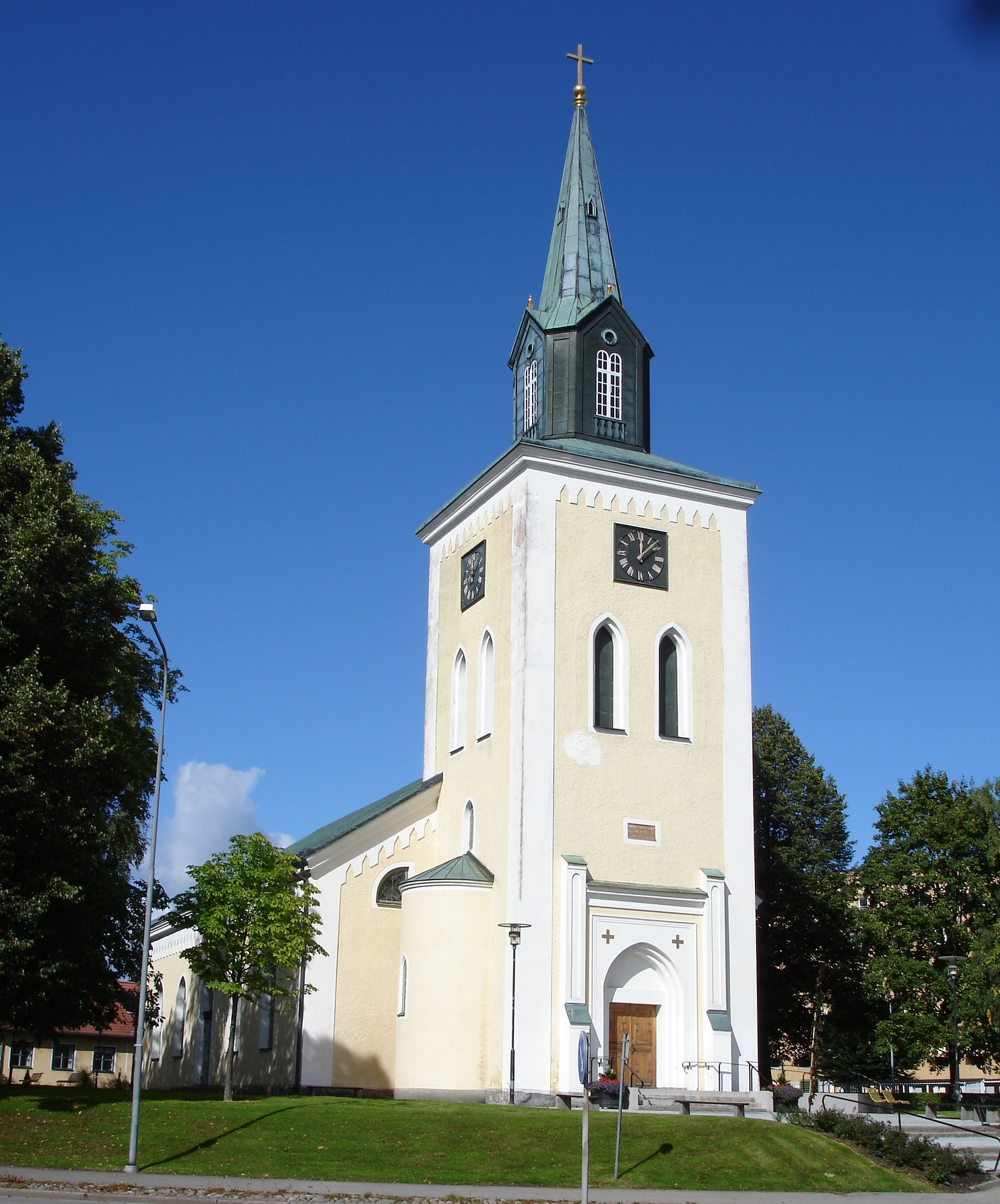 Ljungby kyrka i västra Småland